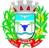 Brasão de Armas do município de Pinhão, Paraná, Brasil.